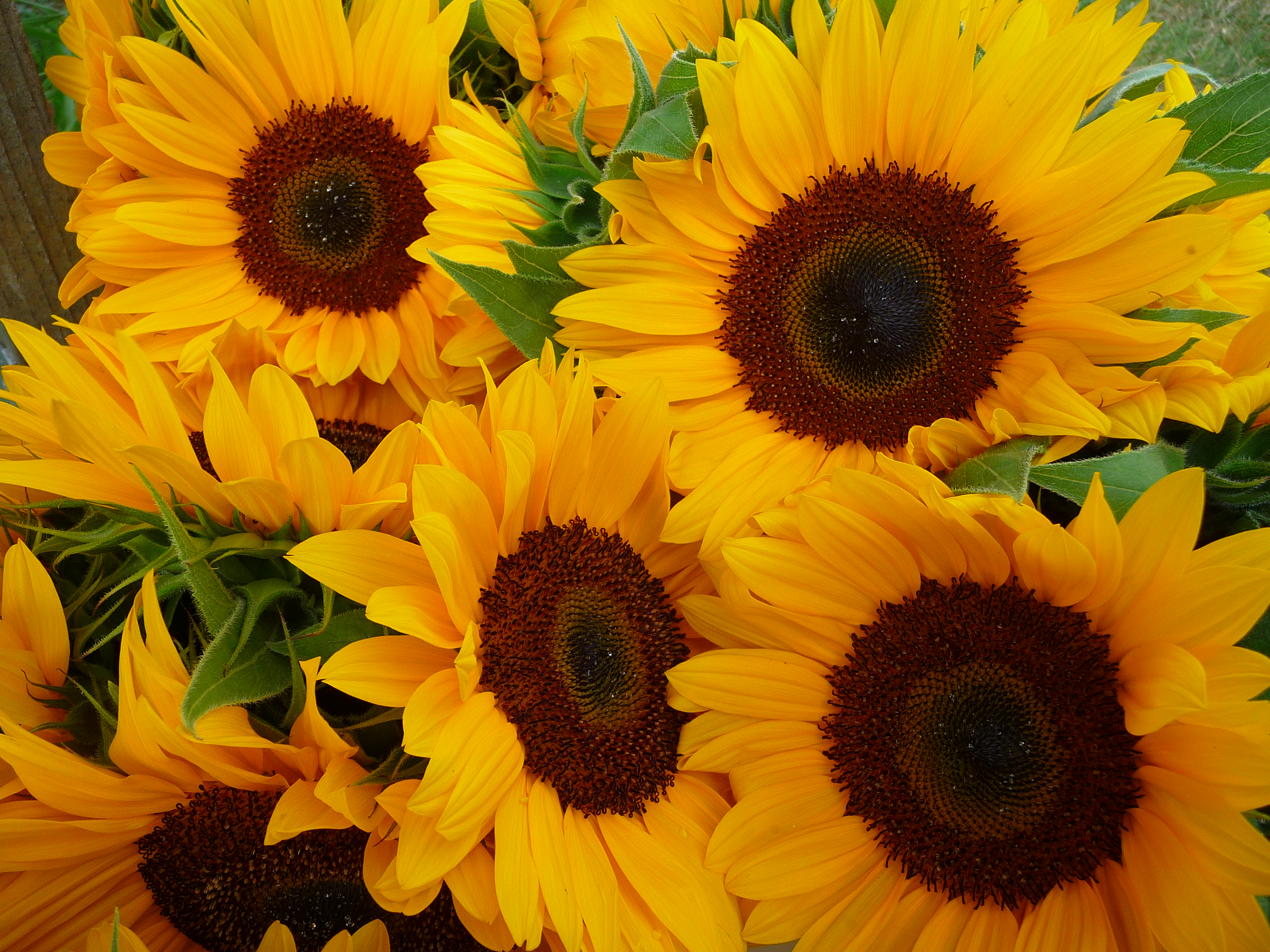 Sonnenblumen (Helianthus annuus)